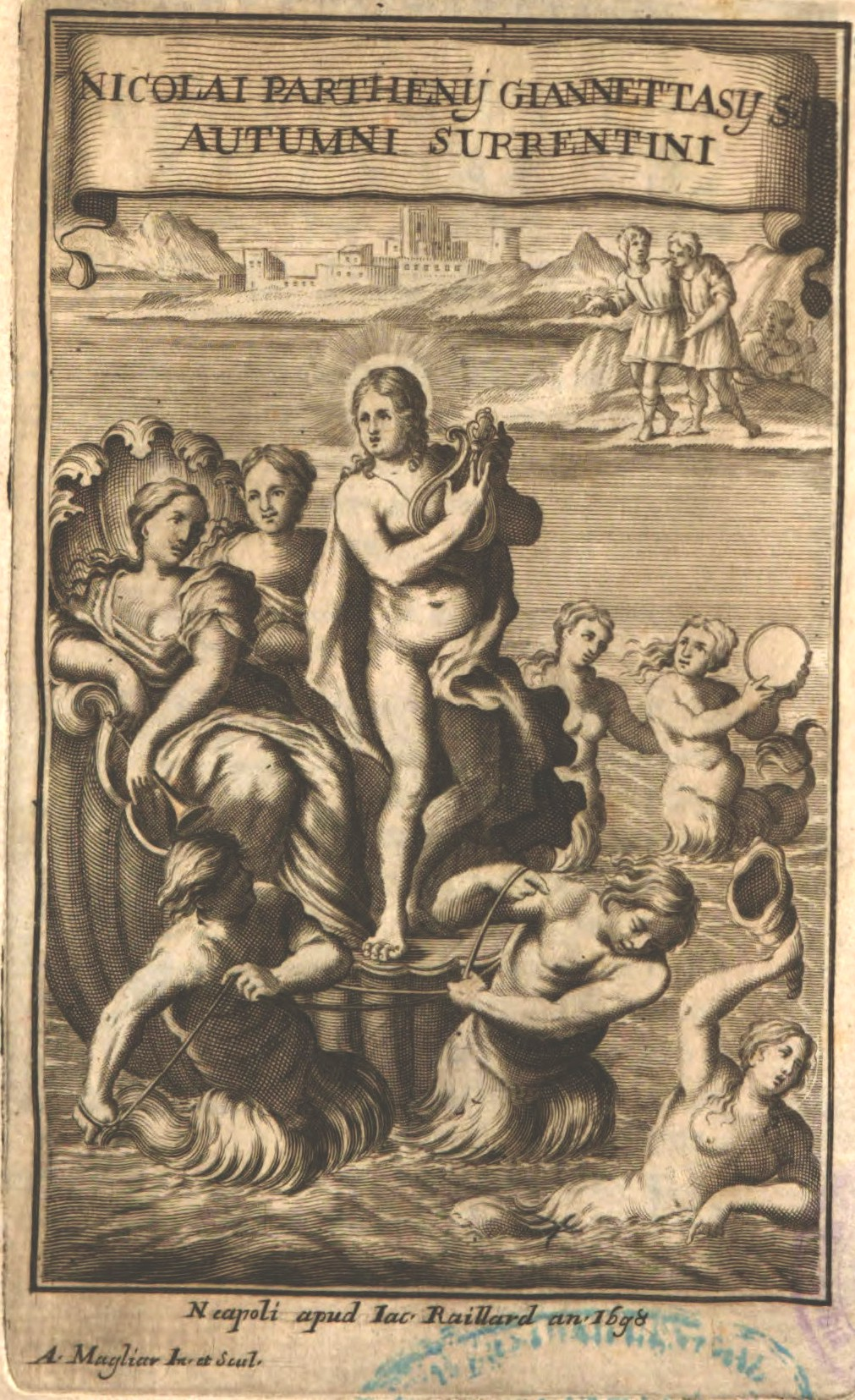 Titulus Autumnorum Surrentinorum Nicolai Parthenii, Neapoli 1698